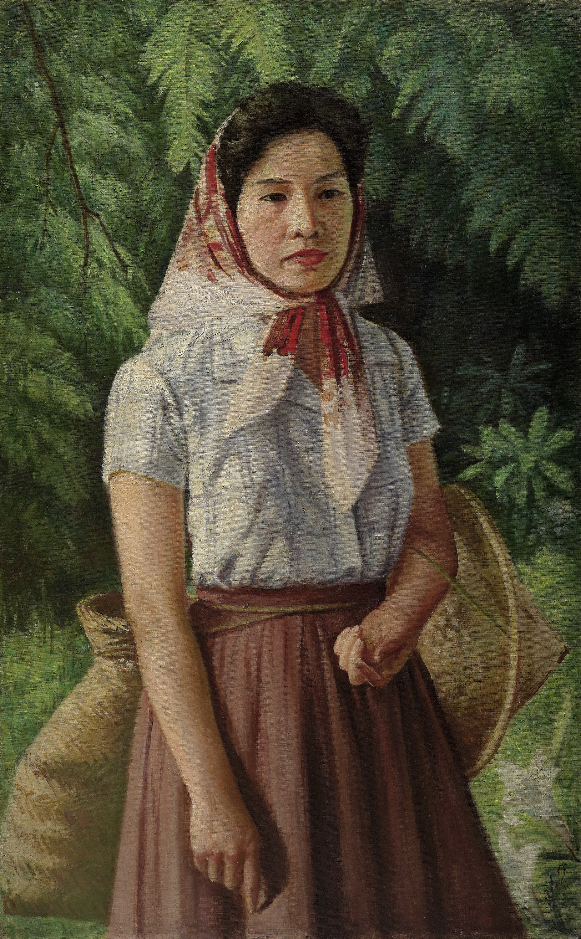 中文（台灣）: 李梅樹作品：(採茶少女)，(1959)，(油彩 畫布)。 李梅樹以女兒為模特兒，將她打扮成採茶姑娘，畫出這幅畫來推廣三峽的茶葉。